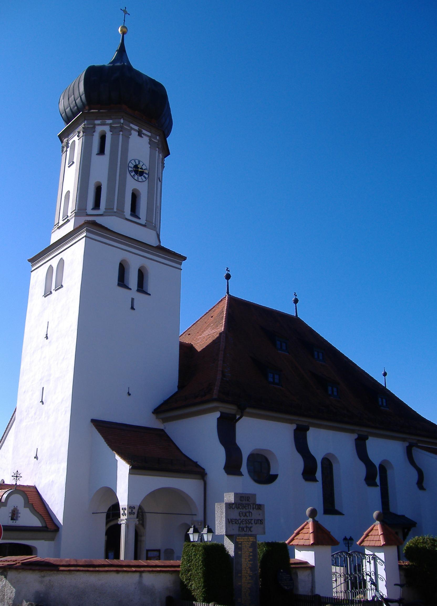 Stepperg